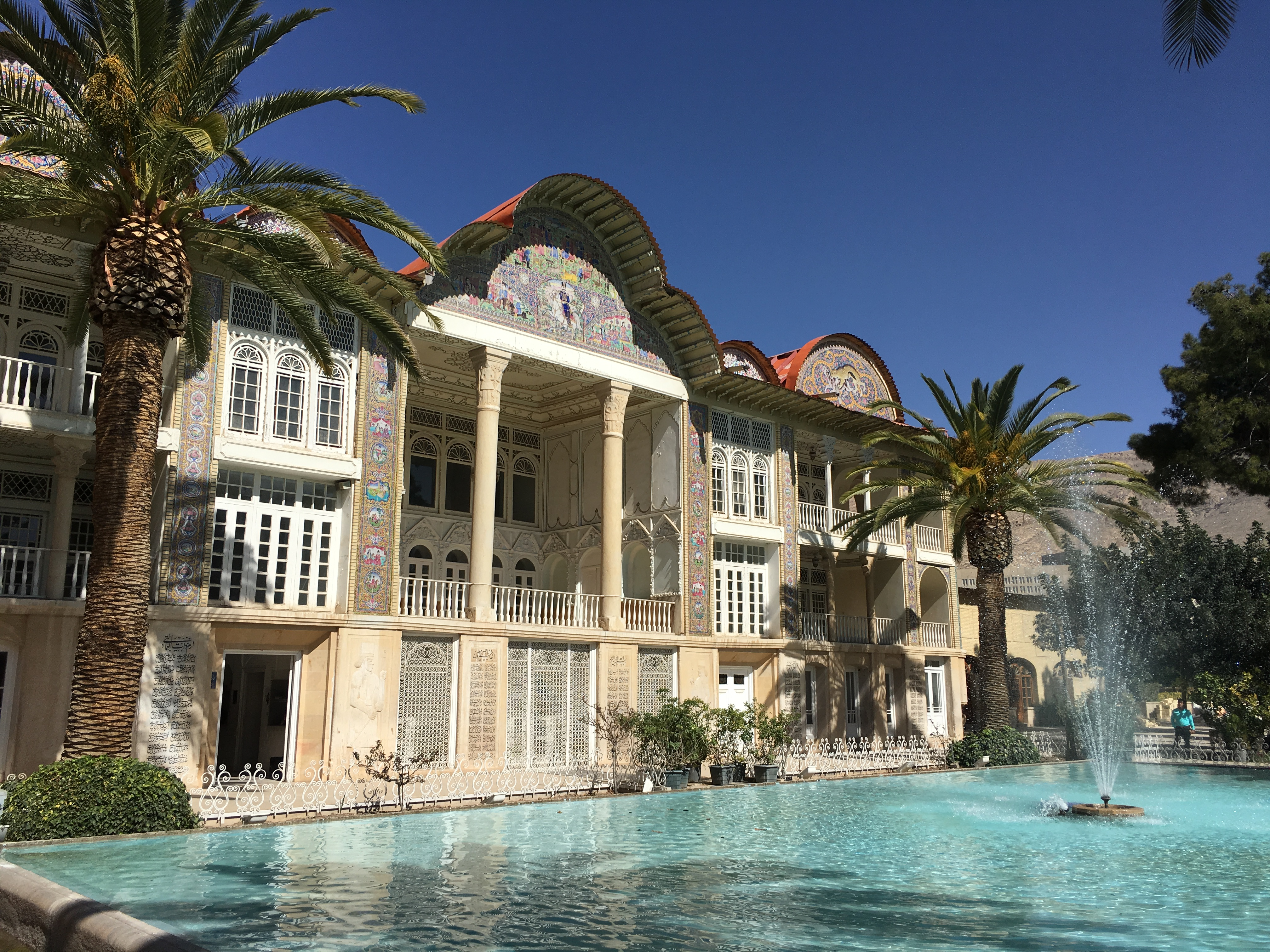 نمایی از بنا